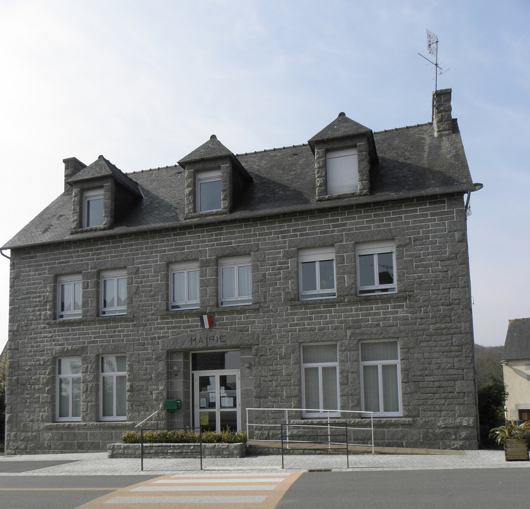 Mairie de Canihuel (22).